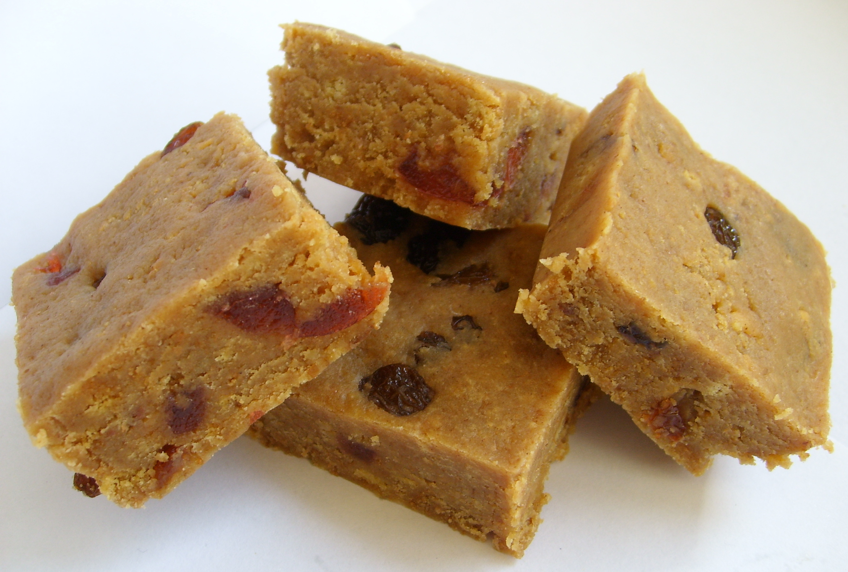 Handmade fruit fudge.